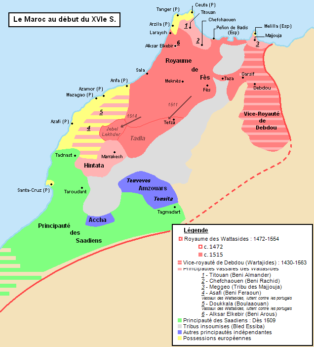 Carte de la situation géopolitique du Maroc au début du XVIe S. (1500-1515) Selon : "Le Maroc dans les premières années du XVIe siècle : Tableau géographique d'après Léon L'Africain", par Louis Massignon, dans "Mémoires de la Société Historique Algérienne I", Éd. Adolphe Jourdan (1906). (Num. OCLC 490558897)